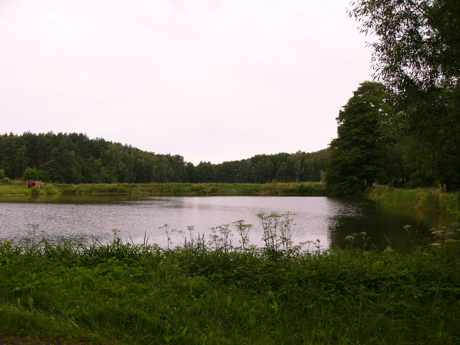 Stawy na Królewskim (Wielkopolska)